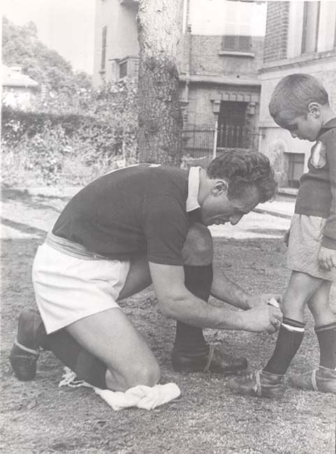 Autore: Luigi Bertazzini Fonte: Archivio Storico Comune di Torino Descrizione: Valentino Mazzola con il figlio Sandro, poco prima dell'incidente avvenuto il 4 maggio 1949 Licenza : Licensing Categoria:Immagini di Valentino Mazzola Categoria:Immagini di Sandro Mazzola